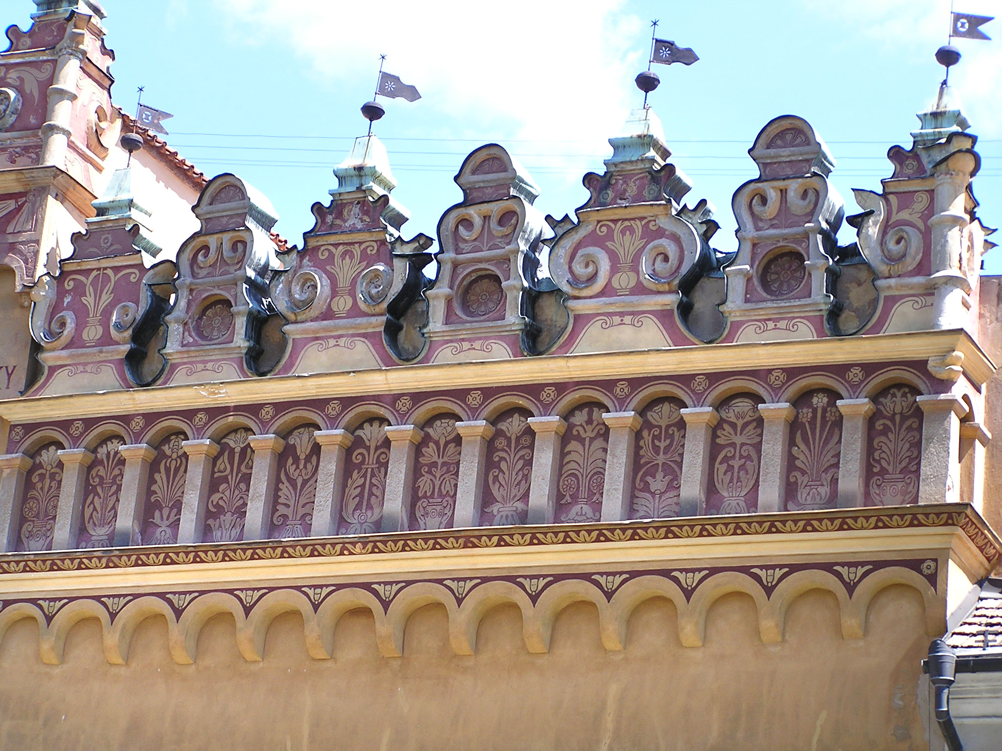 Dom meštiansky, Thurzov palác.